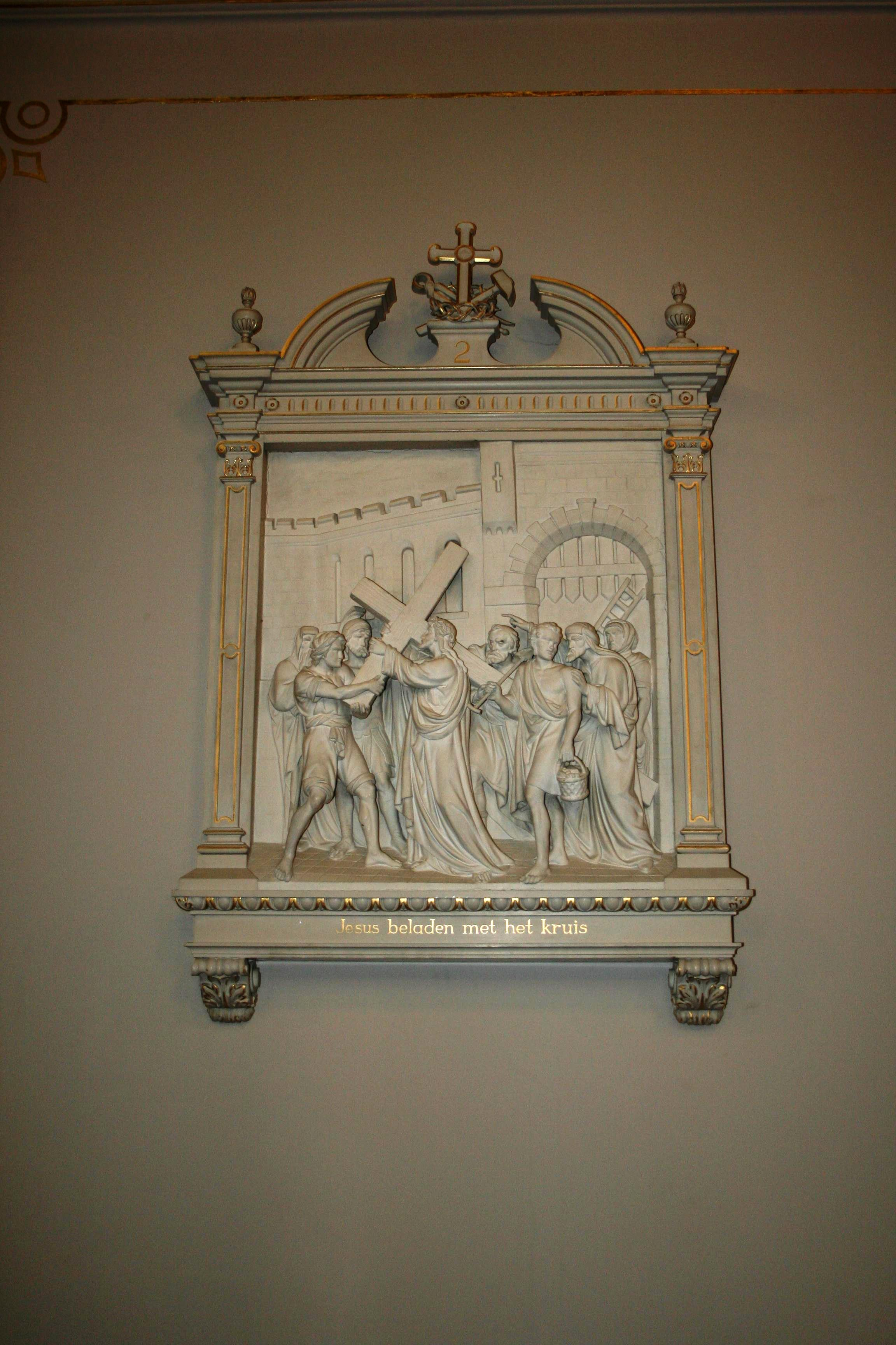 Dit is een foto van 1 van de reliefs in de hartebrugkerk van de kruisiging van jezus. Deze foto heb ik (Robert Smit) gemaakt met mijn canon eos 350D